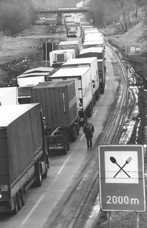 ADN-ZB Peer Grimm 4.12.90 Brandenburg: LKW-Stau-Kilometerlang stauen sich täglich die LKW's an der deutsch-polnischen Grenze, wie hier am Kontrollpunkt Frankfurt-Oder. Der Grund: veränderte Zollbestimmungen seit dem Beitritt der DDR zur Bundesrepublik.